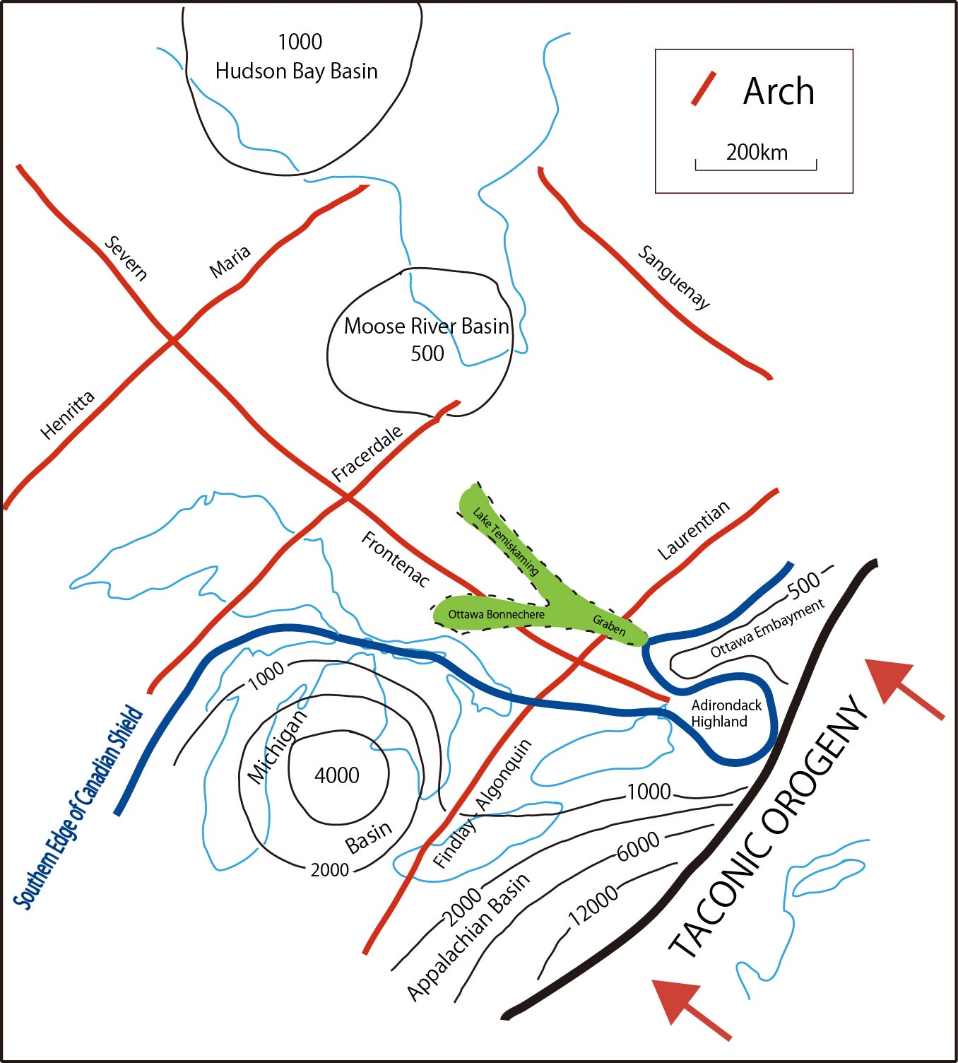 北米大陸東岸の地向斜と鞍部